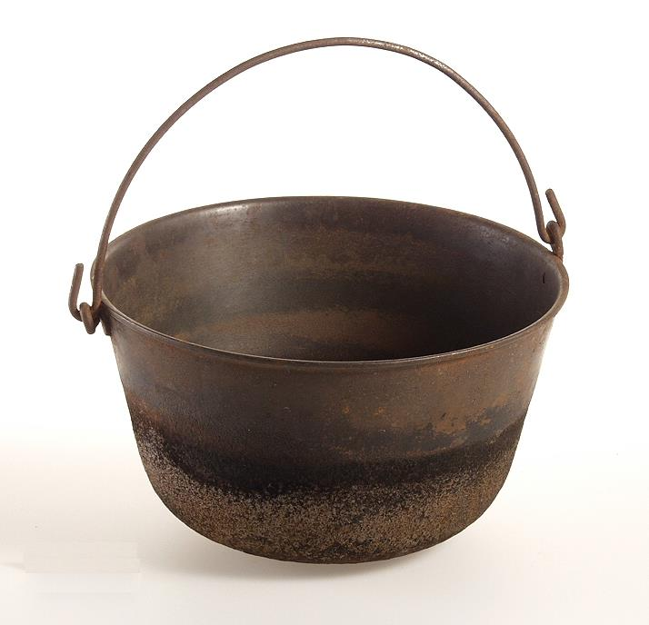 Polentakessel